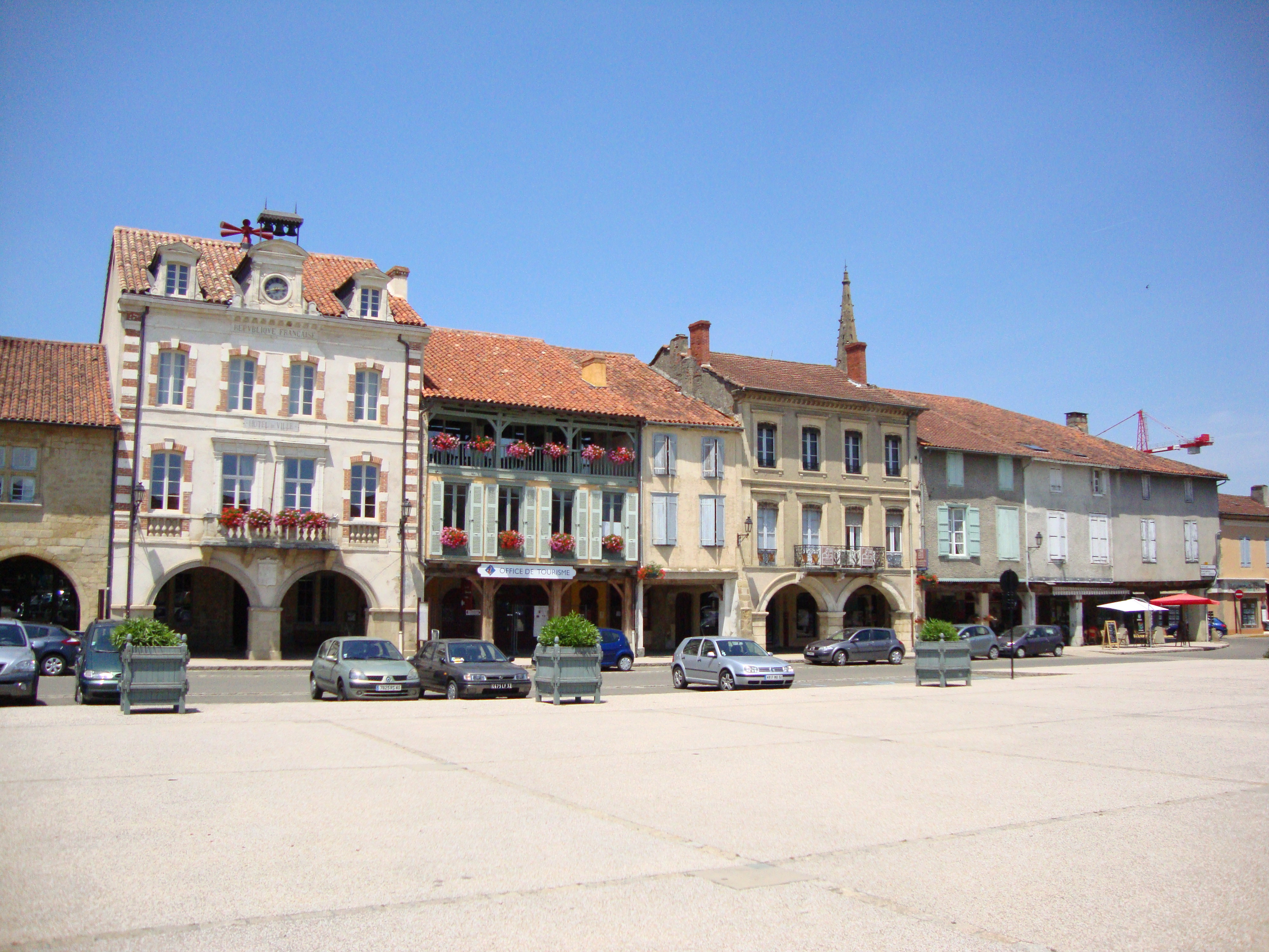 Marciac (Gers, France) la grande place centrale, coeur de la Bastide. A gauche la mairie; en dessus des maisons: tour de l'ancien monastère des Augustins, actuellement musée de jazz